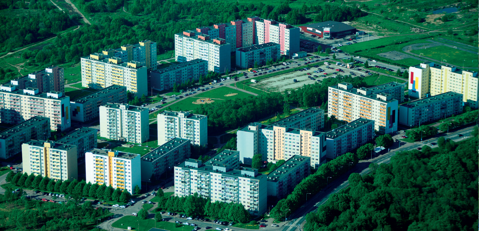 Õhuvaade Katleri asumile